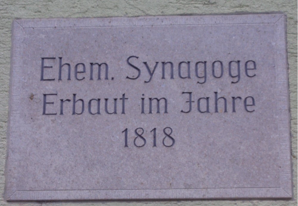 Hinweis auf die Geschichte des Hauses Rathausstr. 5 in Hohebach (ehemalige Synagoge)